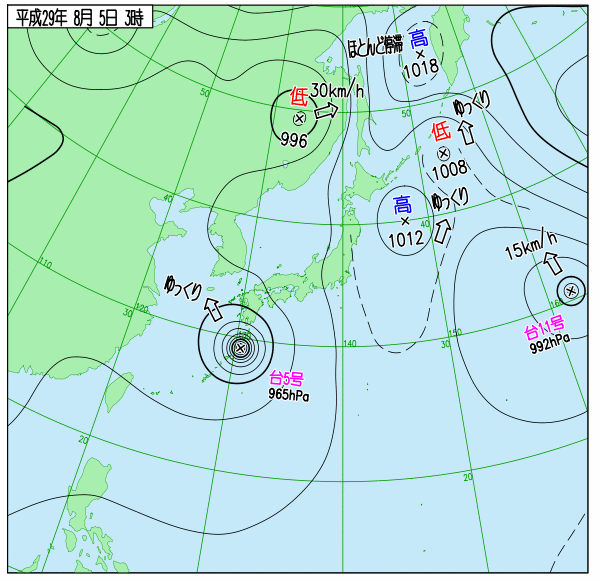 2017年8月5日3時の日本付近の天気図。